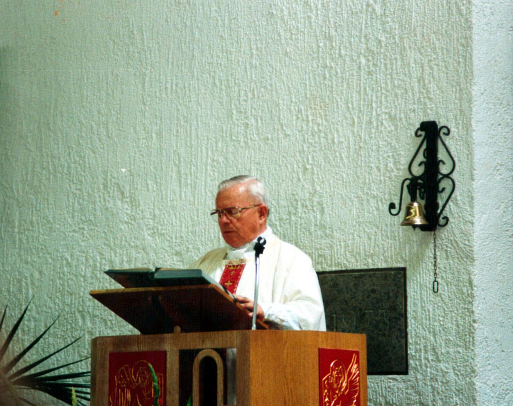 Mons. Jozef Medovy durante una celebrazione liturgica nella parrocchia S. Francesco d'Assisi a Marina di Cerveteri.